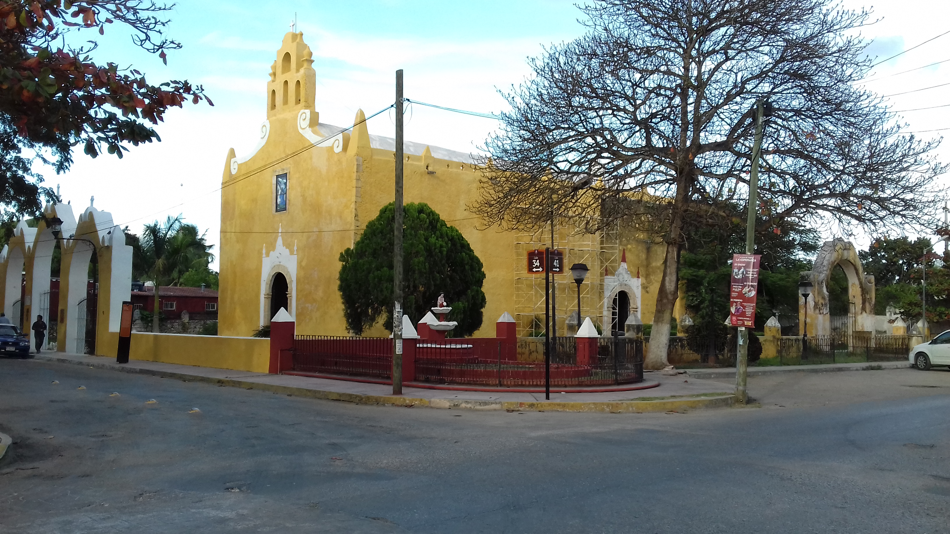 Parroquia Católica de Santa Ana Valladolid, Yuc 2018